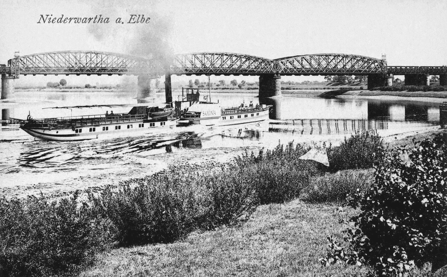 Niederwartha; Elbe, Brücke, Dampfer Saxonia This postcard is from publisher Brück & Sohn in Meißen ( postcard has a unique number 22020 and is available in a higher resolution at the publisher. This images was uploaded in a cooperation project between Wikipedians and the publisher.